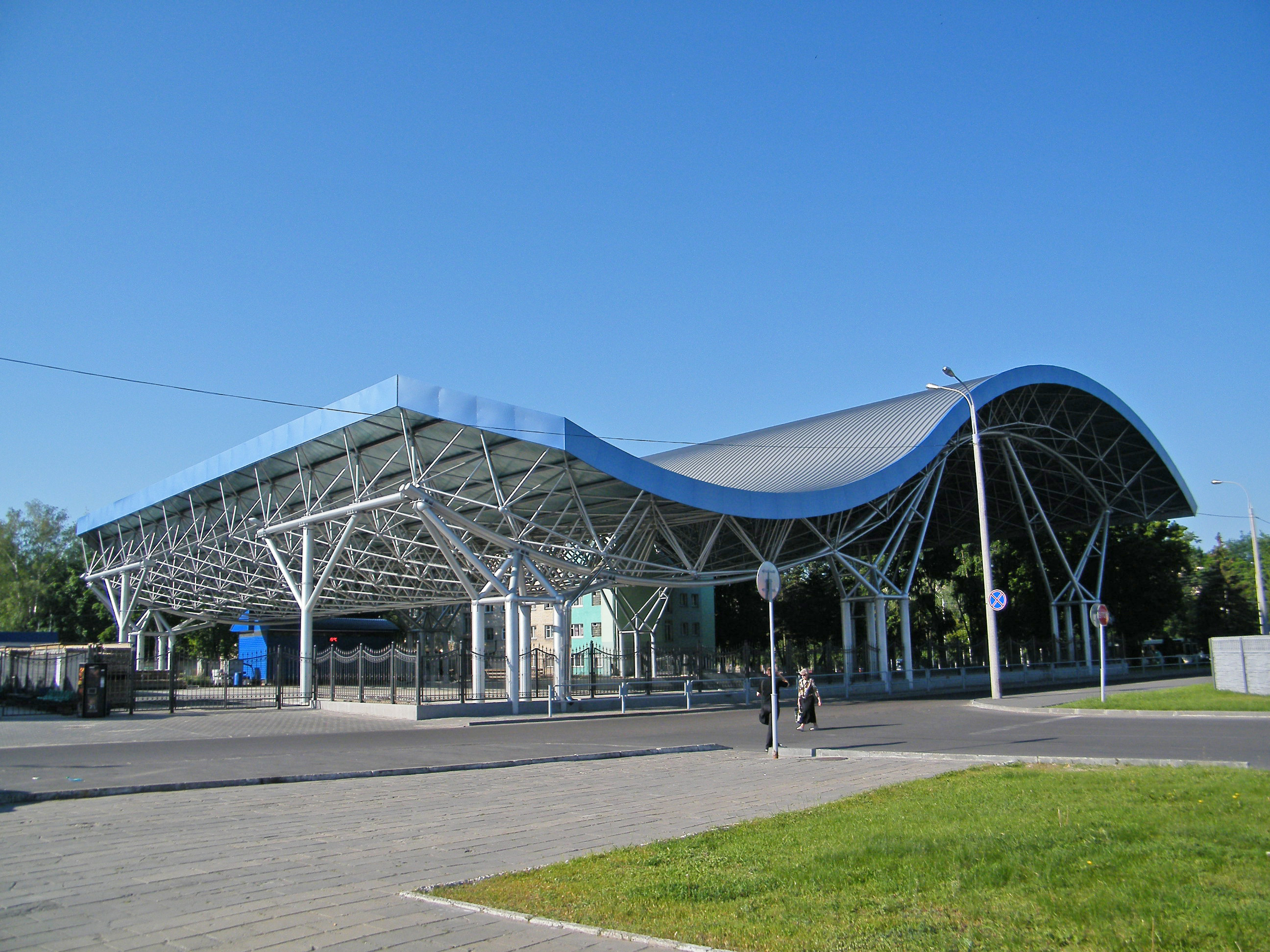 Каток